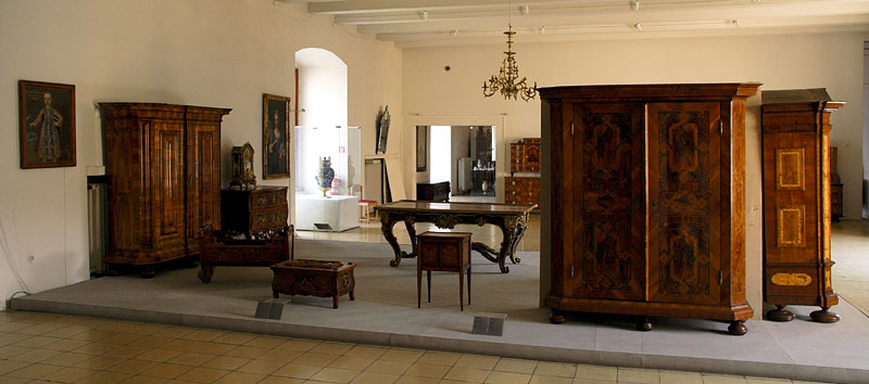 Bratislava Castle - Slovak National Museum.Bratislava Castle - Slovak National Museum.